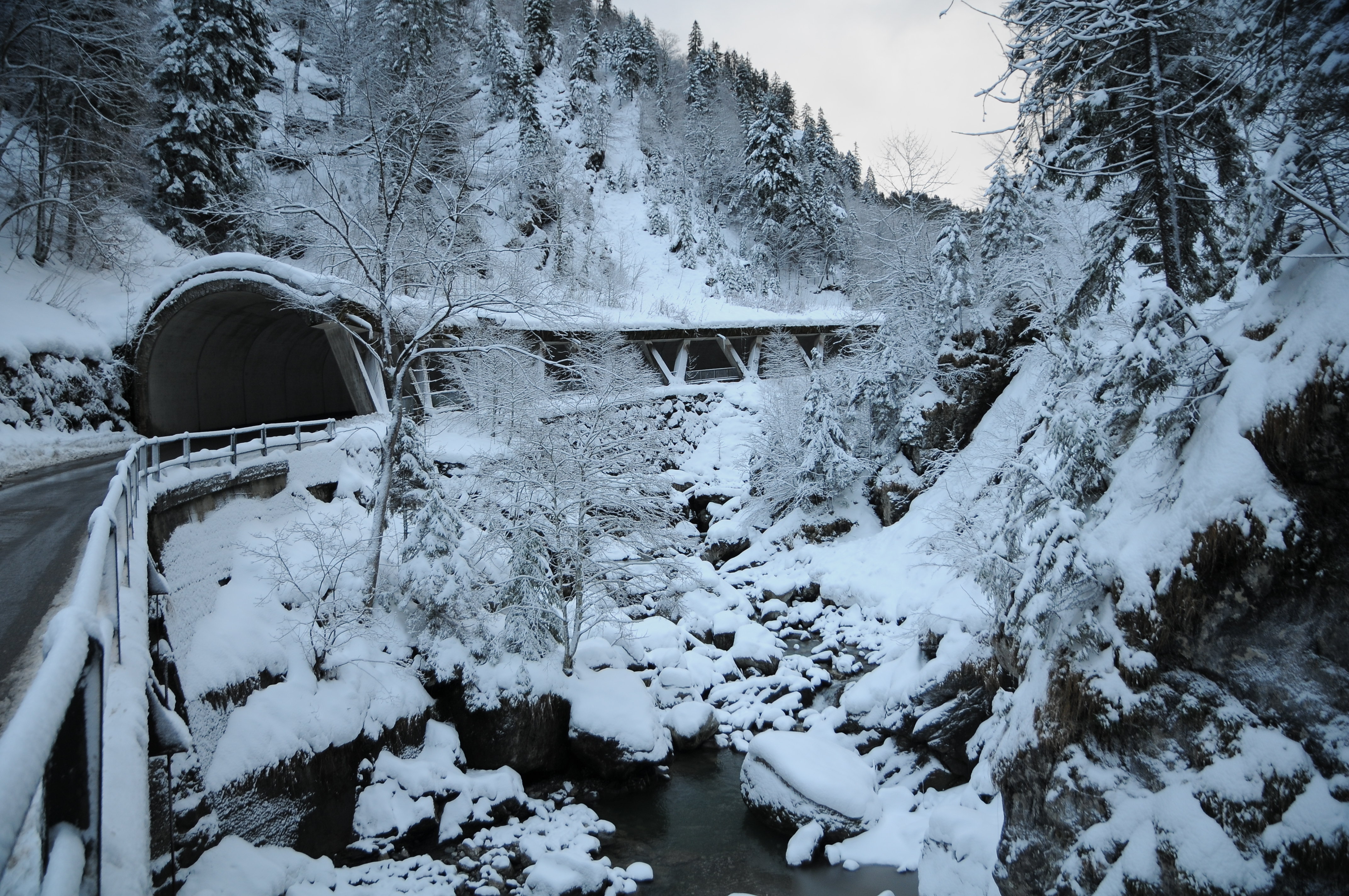 Strasse von Dornbirn in das Bergdorf Ebnit im Winter.